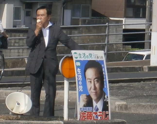 広島県選出の元参議院議員であった佐藤公治の街頭演説の様子。2013年6月17日に広島県福山市の国道二号線神島橋西詰交差点で撮影。